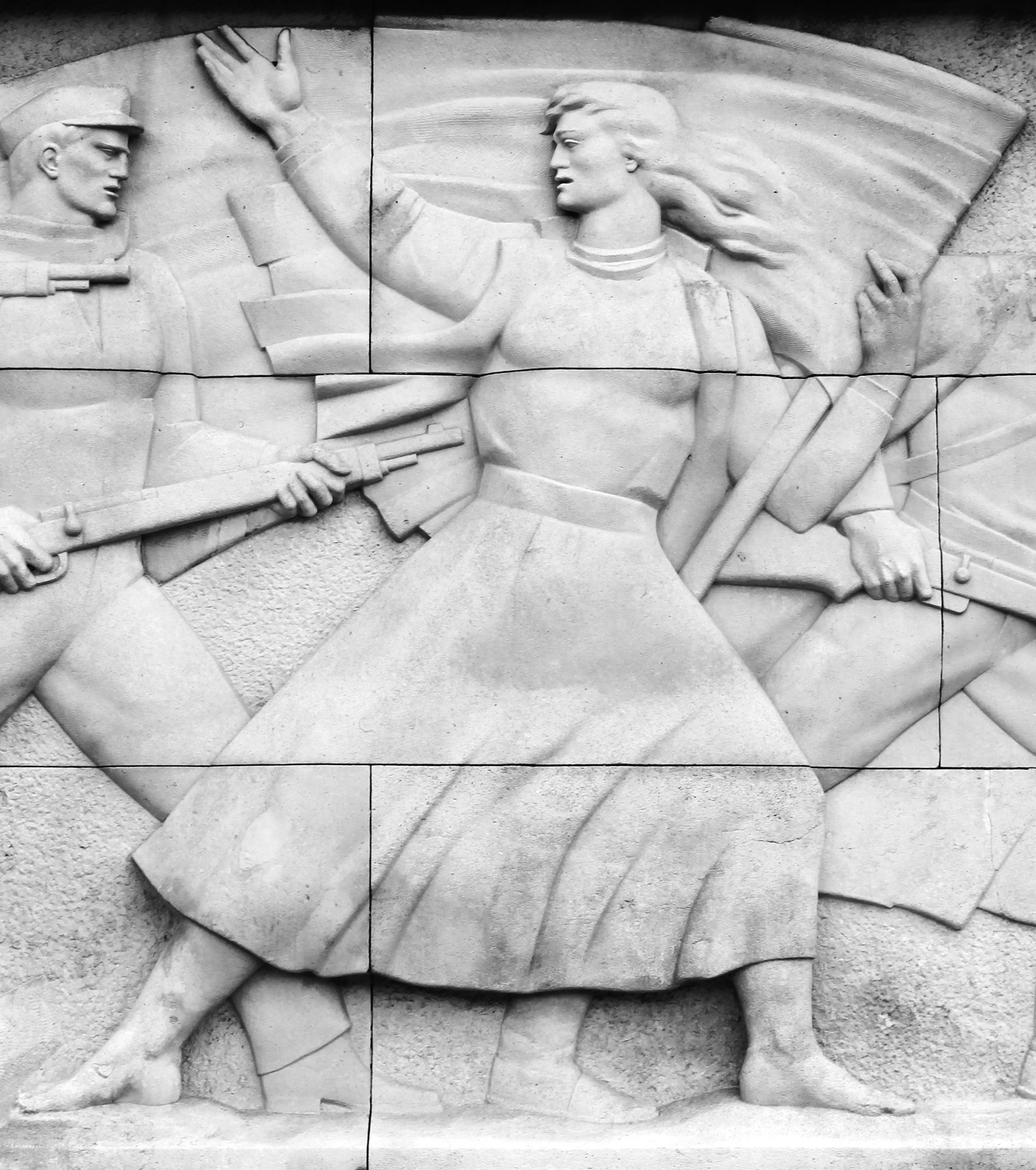 Deo reljefa na Groblju oslobodilaca Beograda 1944.